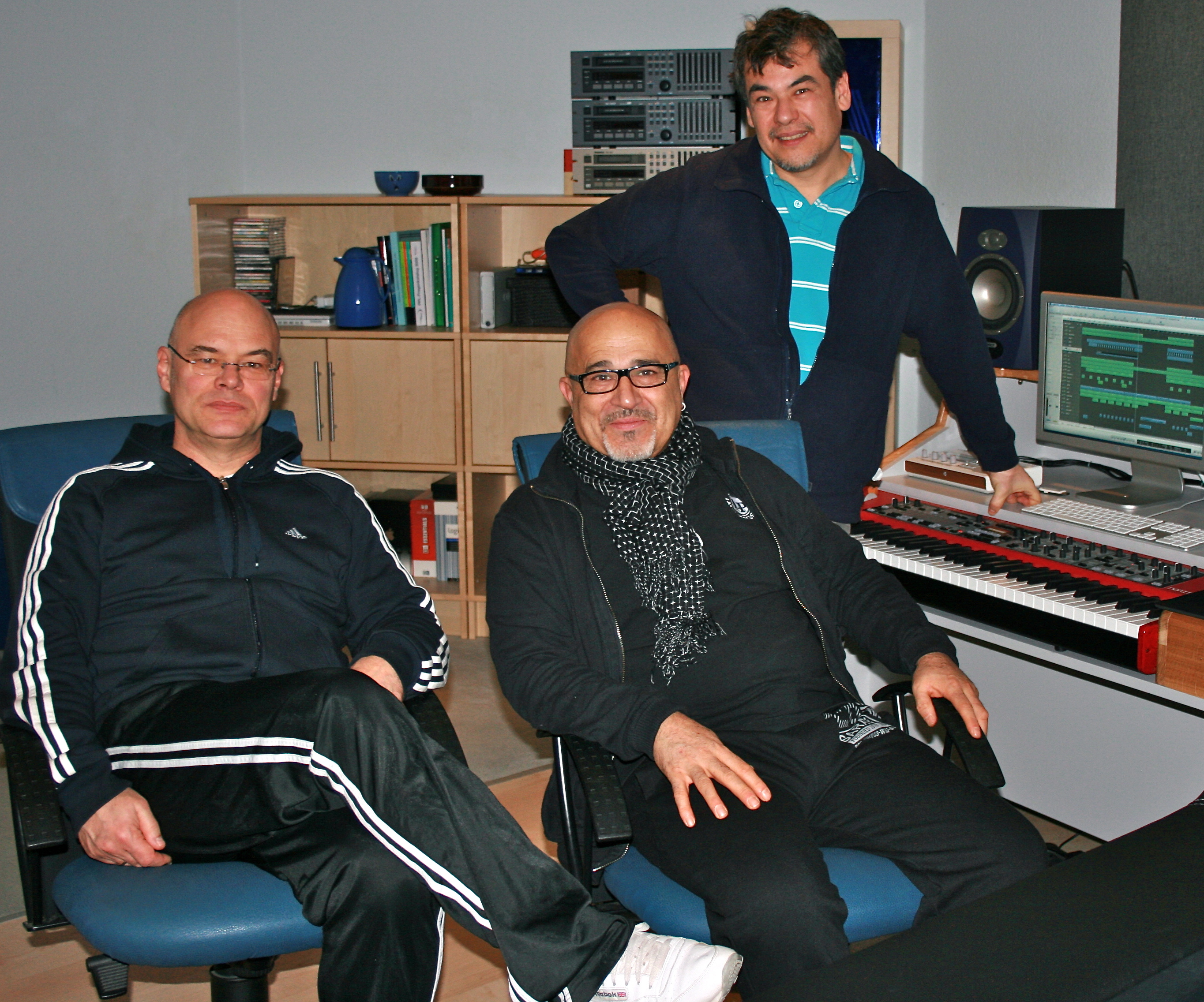 Planet Lounge